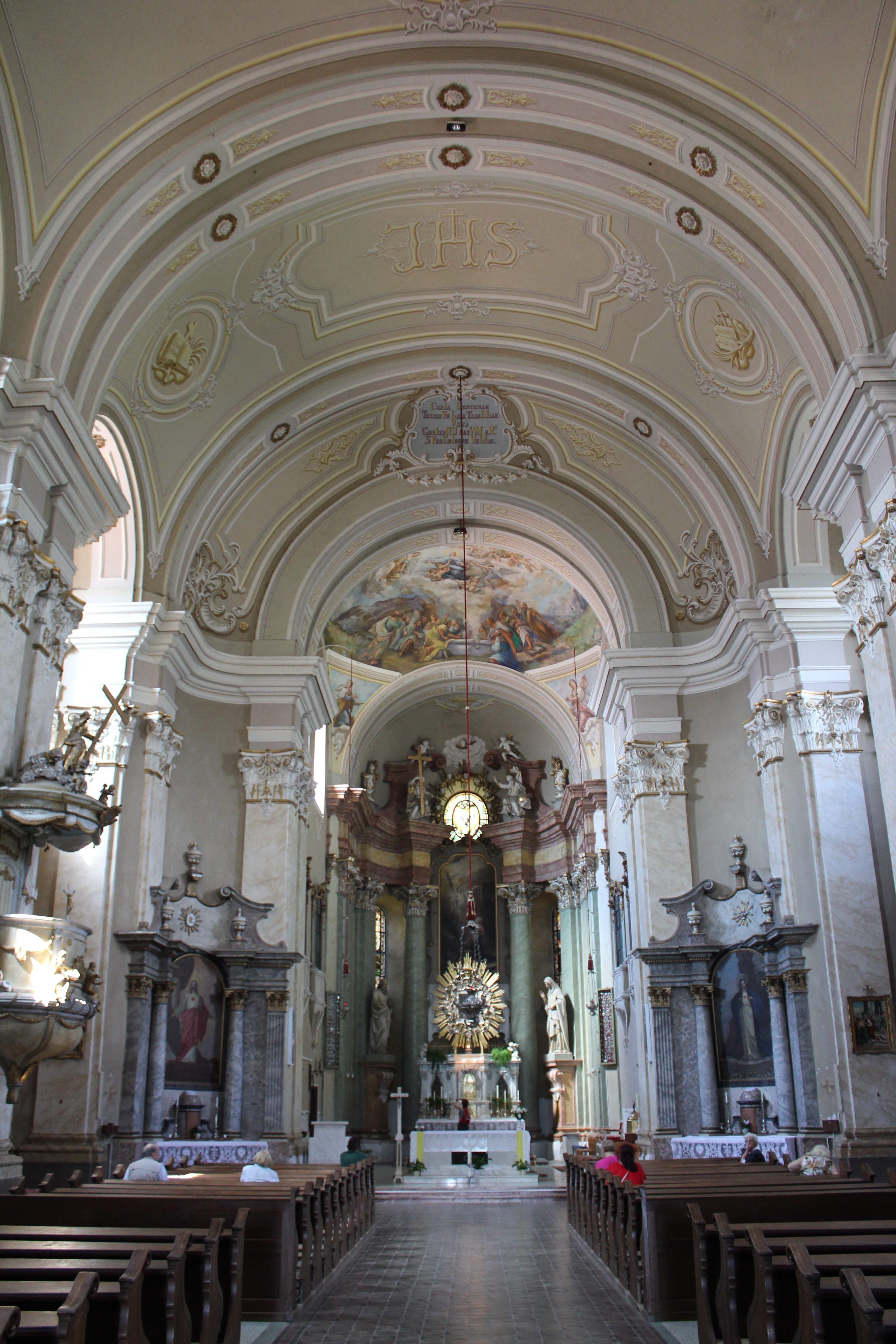 Biserica romano-catolică "Sf. Maria" - interior 01